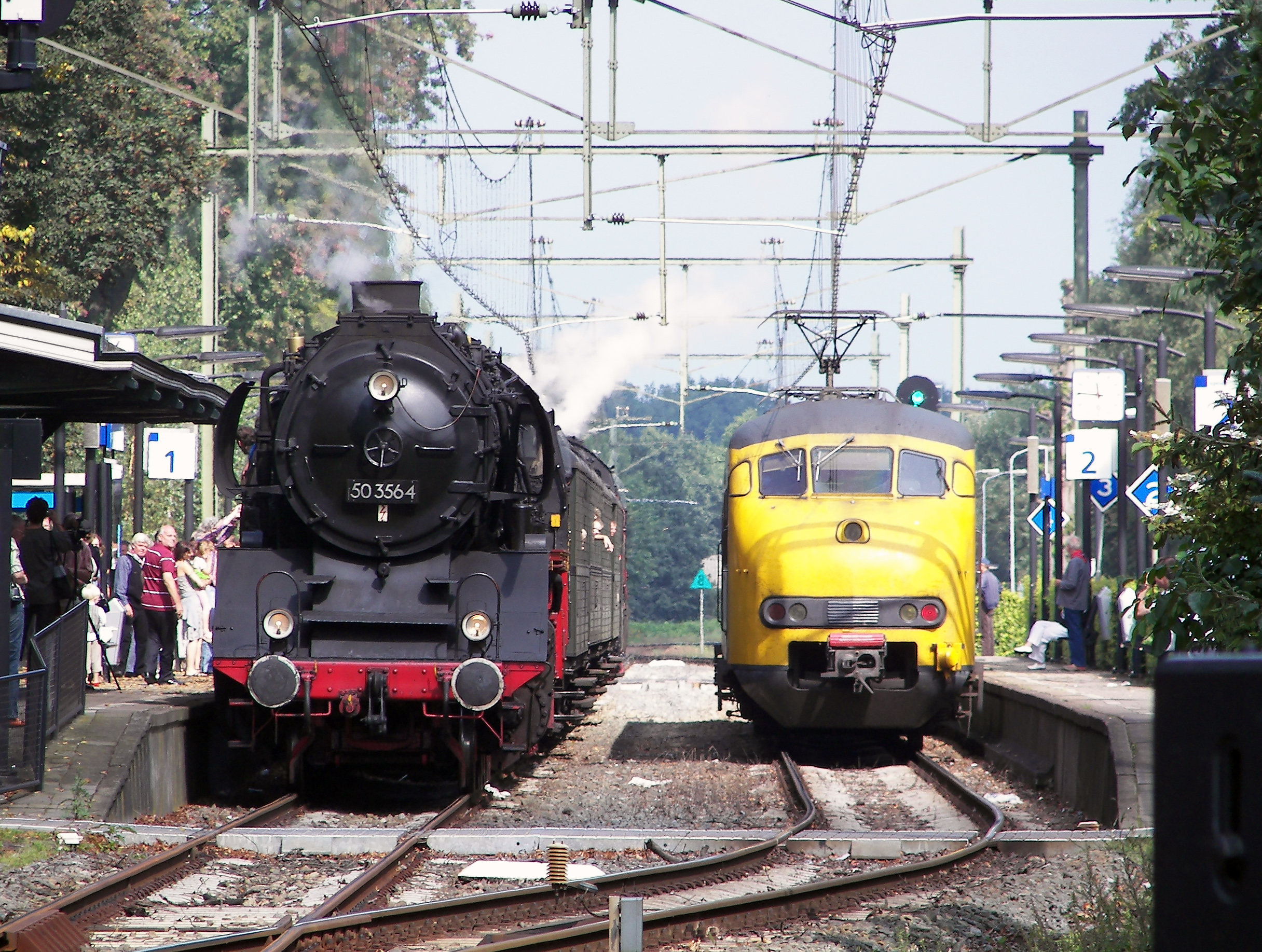 Uit den ouden doosch.